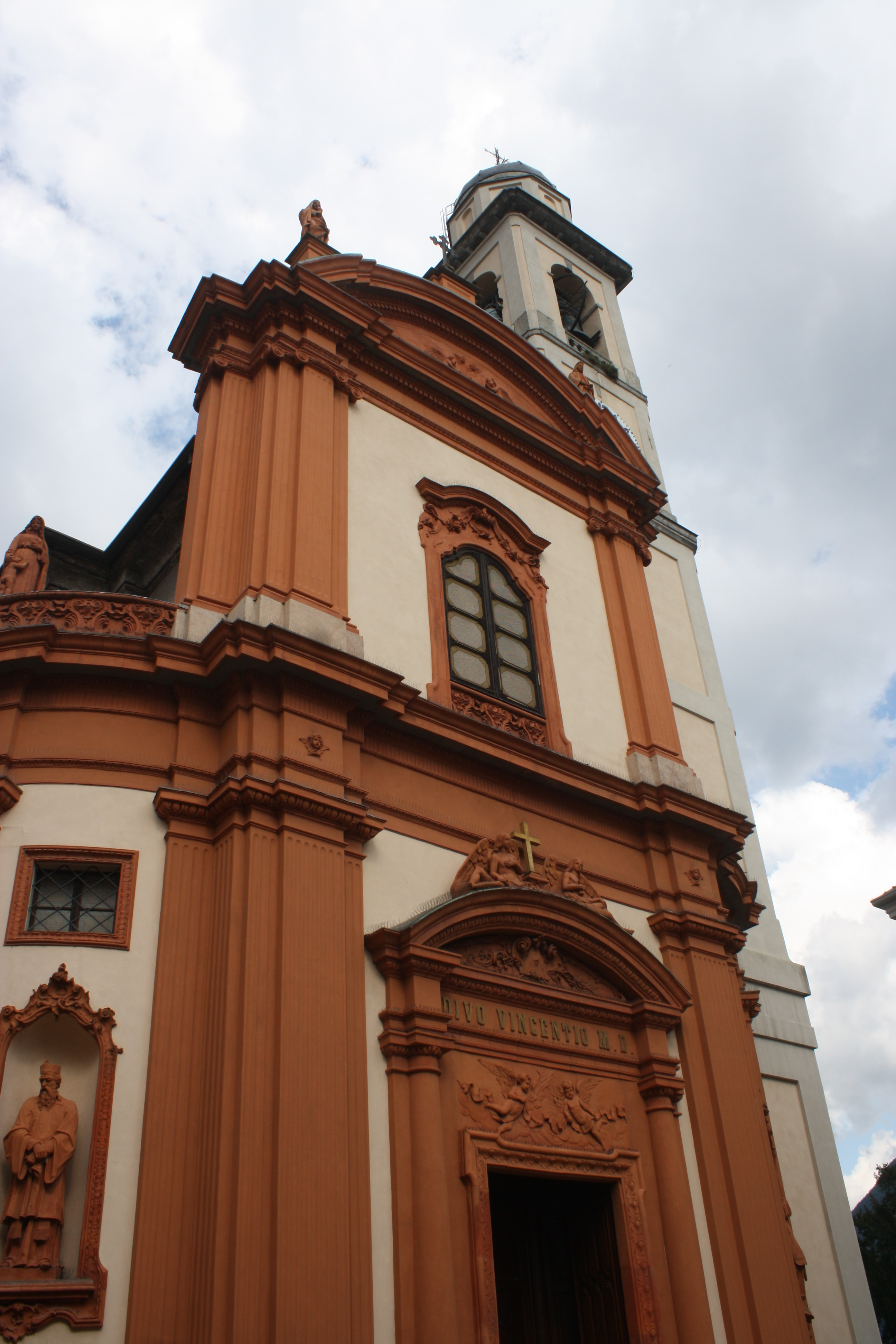 La facciata della chiesa di San Vincenzo a Cernobbio This is a photo of a monument which is part of cultural heritage of Italy.